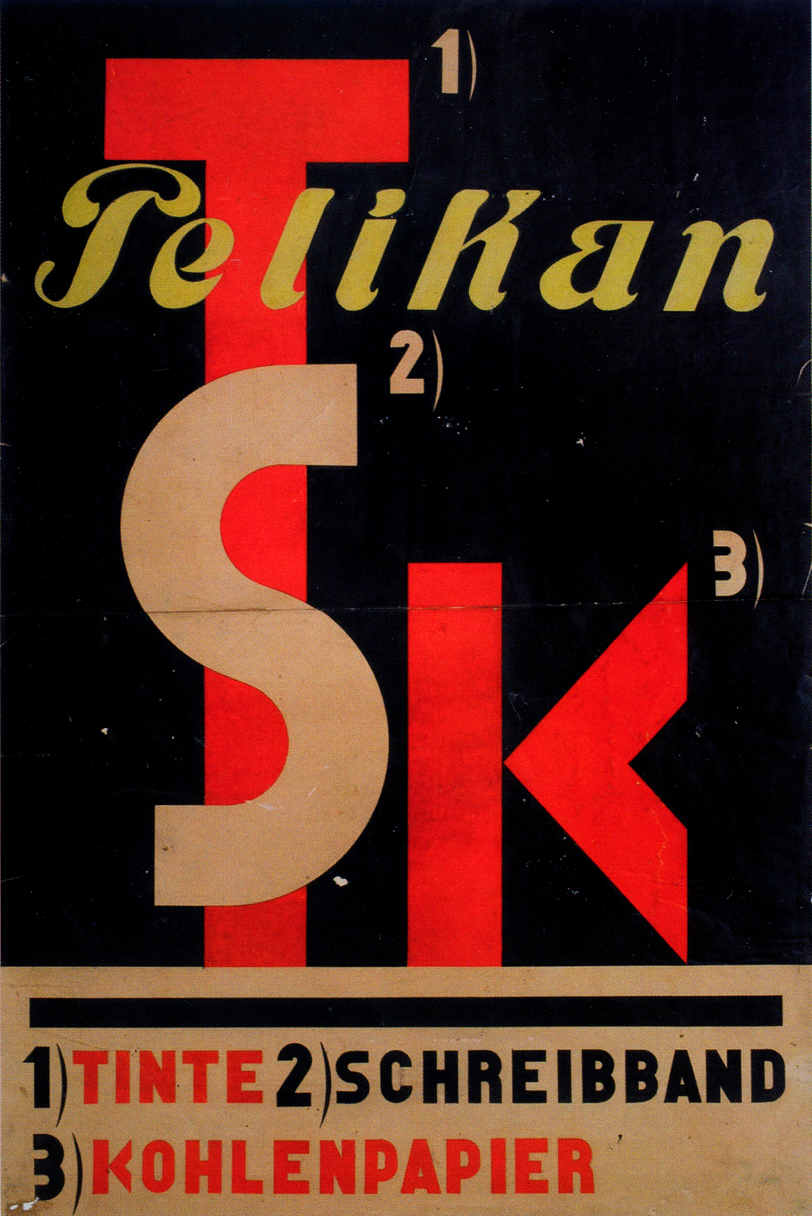 Plakat von El Lissitzky aus dem Jahr 1929 für das Unternehmen Pelikan AG mit den Buchstaben T S K für Tinte, Schreibband und Kohlenpapier. Vorlage: Horst-Dieter Görg, Dieter Tasch: Hannovers Technik in der Werbung, in dies. (Hrsg.): Es begann in Hannover... Kekse - Kommißbrote - Rechenmaschinen. Über Persönlichkeiten, Traditionsunternehmen und Meilensteine der Technik-Geschichte, mit Beiträgen von Torsten Hamacher ..., in Kooperation mit dem Technik-Forum Hannover e.V., 1. Auflage, Hannover: Leuenhagen & Paris, 2011, ISBN 978-3-923976-84-3, S. 64–81; hier: S. 71 ...